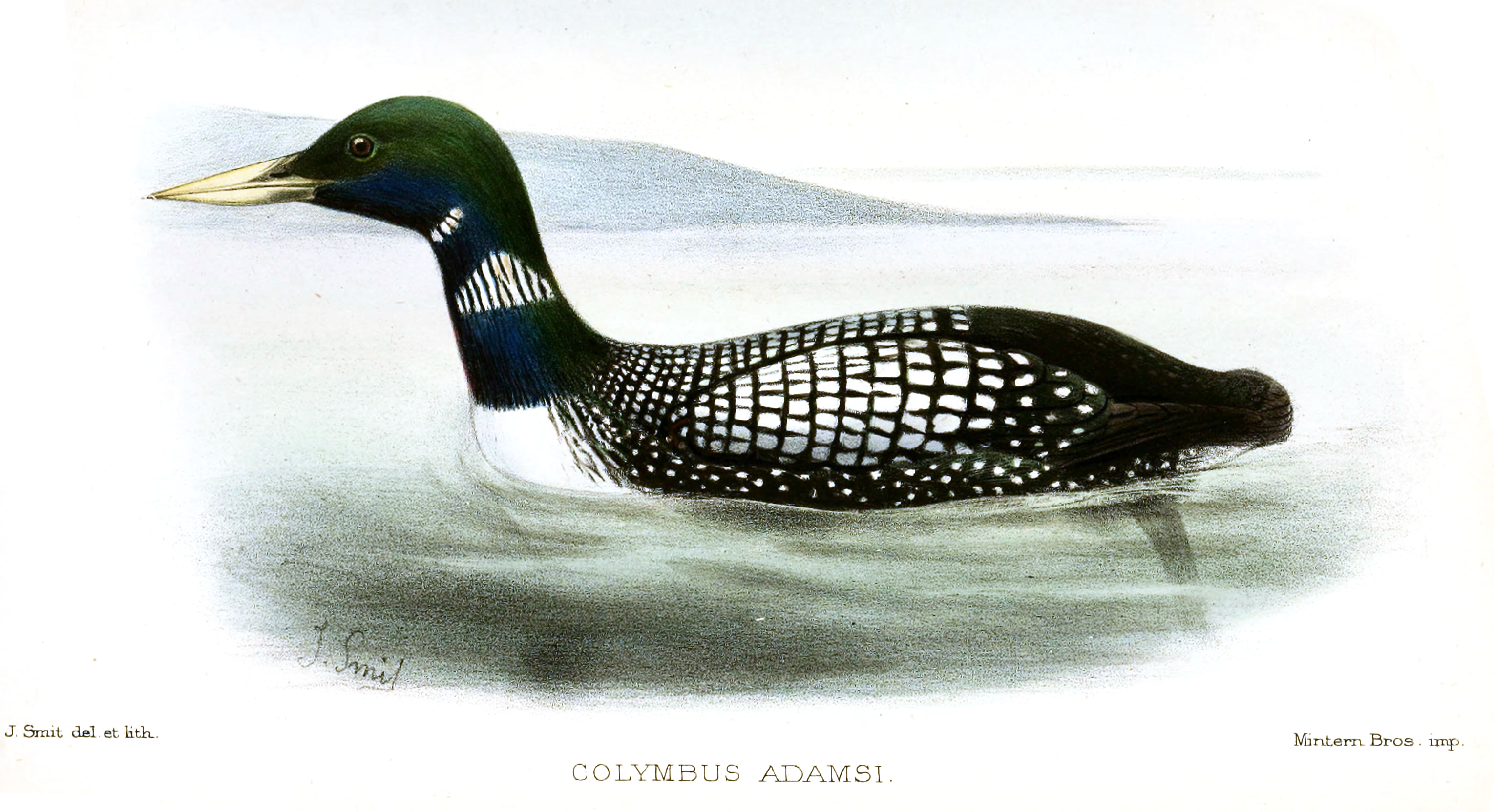 Colymbus adamsi=Gavia adamsi